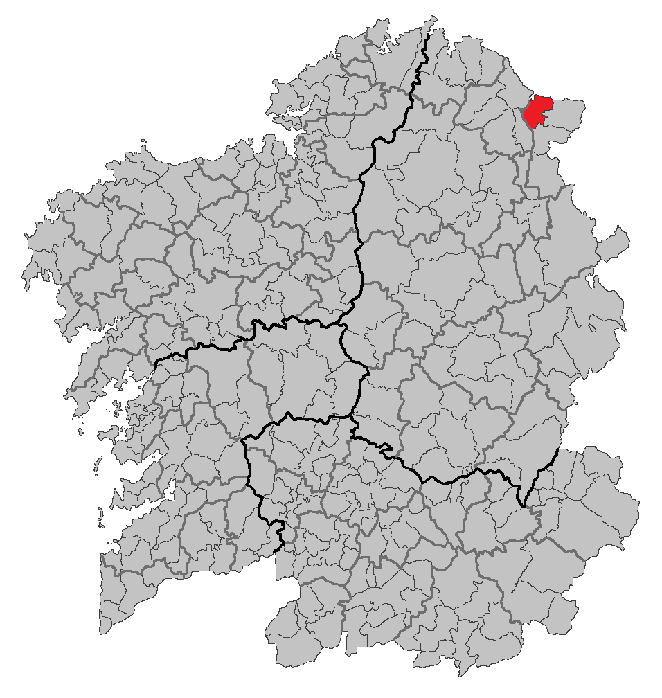 Mapa coa localización do concello de Barreiros.